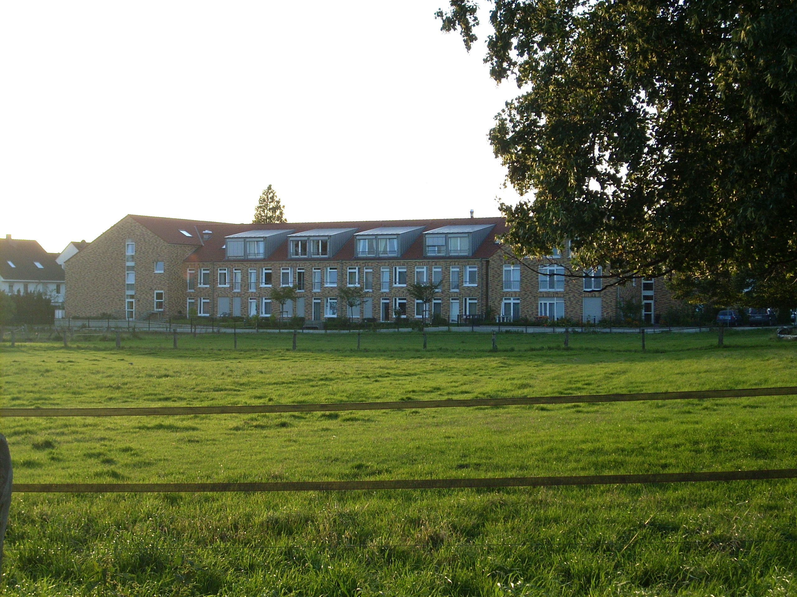 Die Südseite des St. Sebastian Stift in Duisburg-Mündelheim